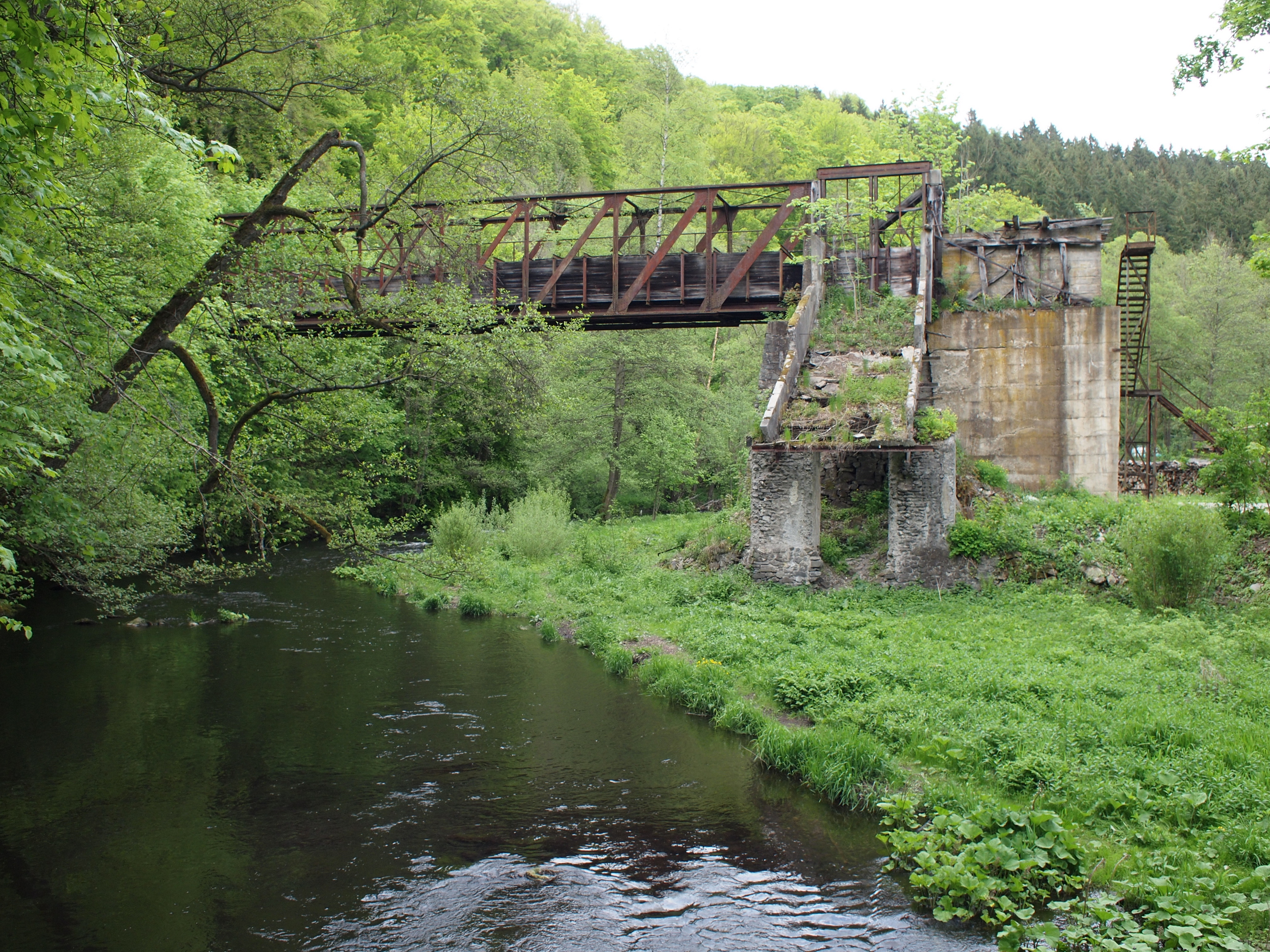 Alte Wasserbrücke Altenbrak/Harz